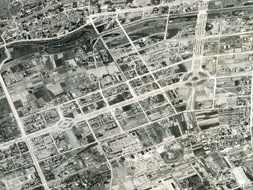 File link: [1]